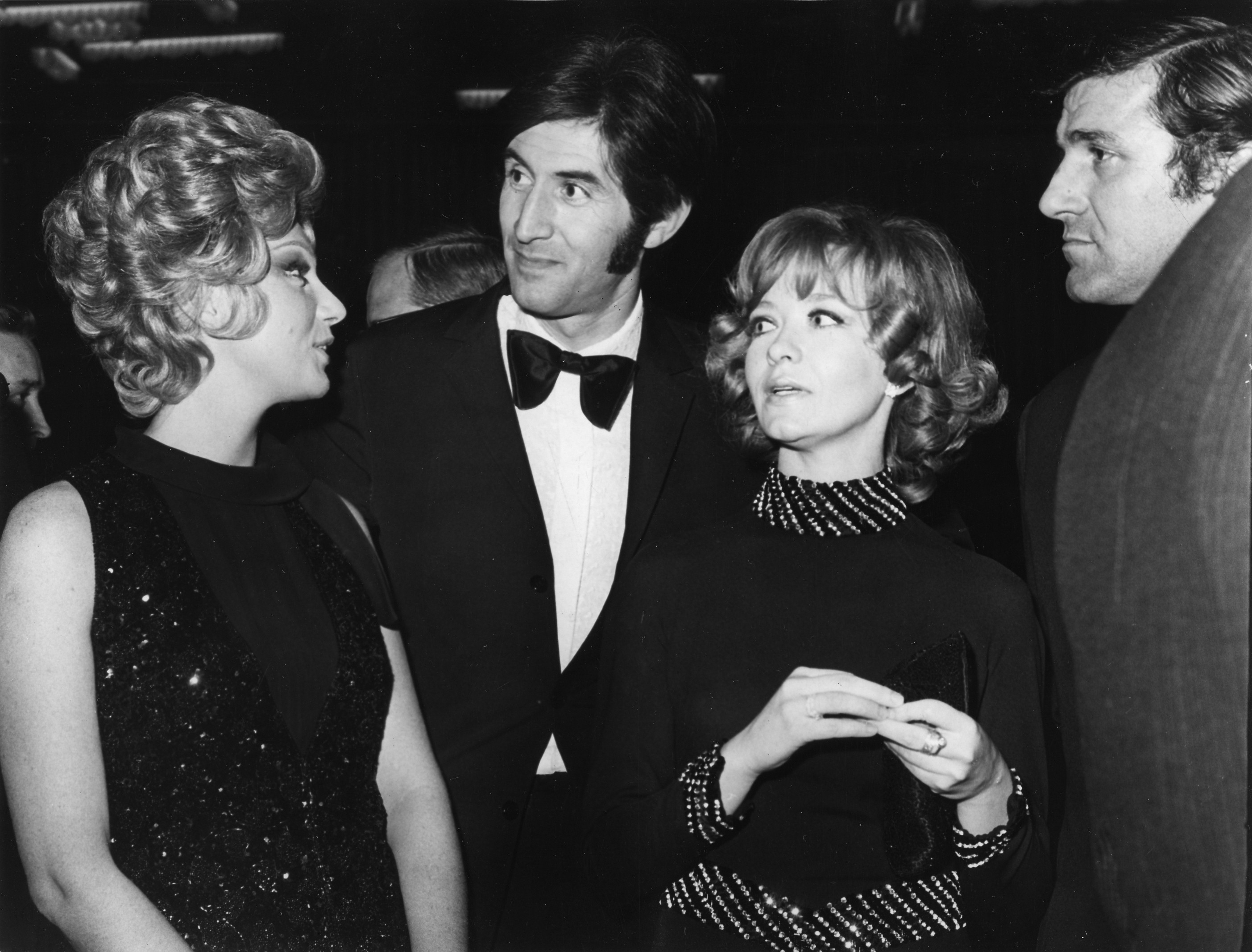 Milena Dravić, Ljubisa Samardzić, Bata Zivojinović, Bitka na Neretvi, premijera. Autor fotografije Stevan Kragujević (po odobrenju Tanje Kragujević)